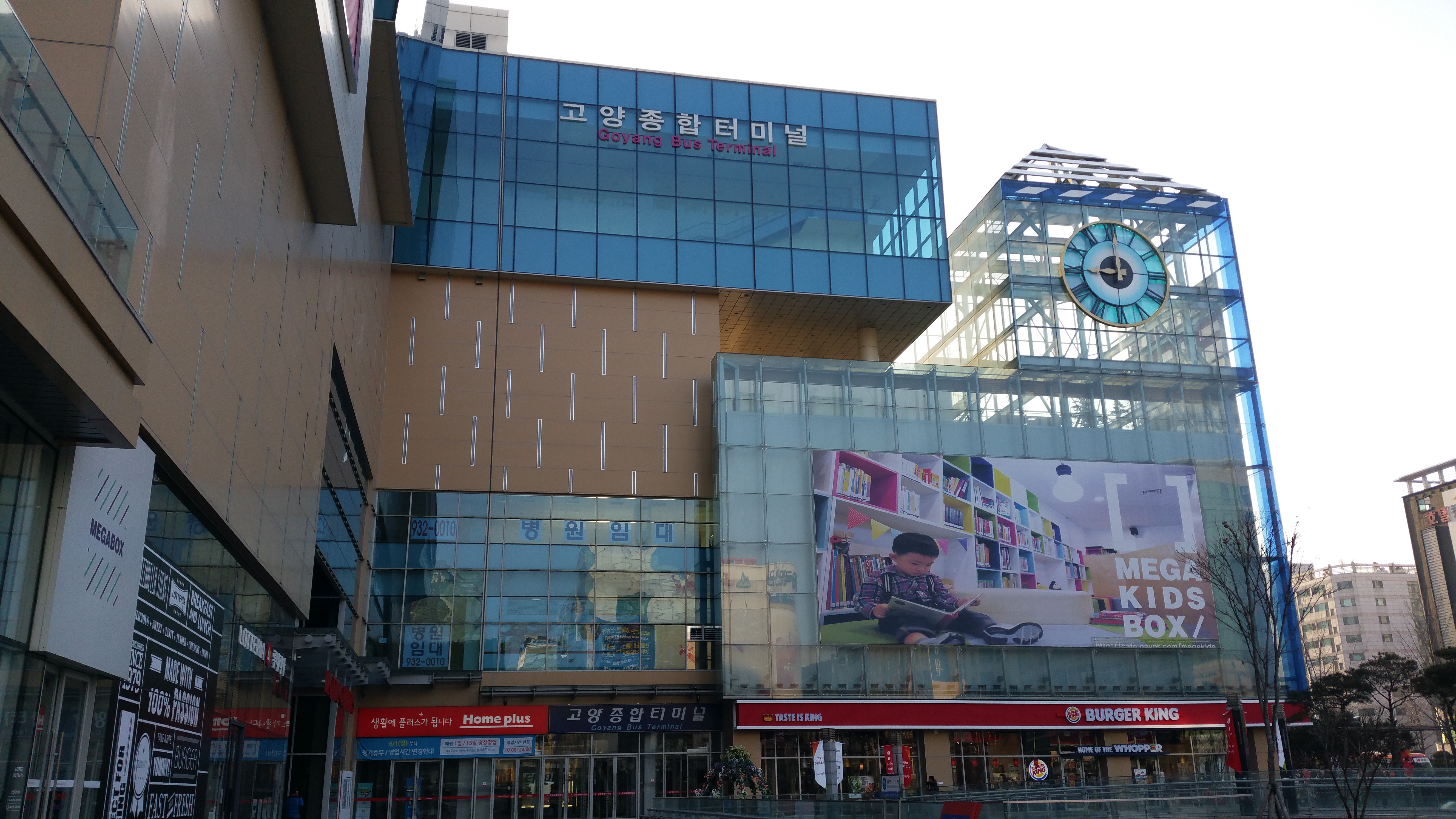 2016년 1월 22일에 촬영된 고양종합터미널 모습